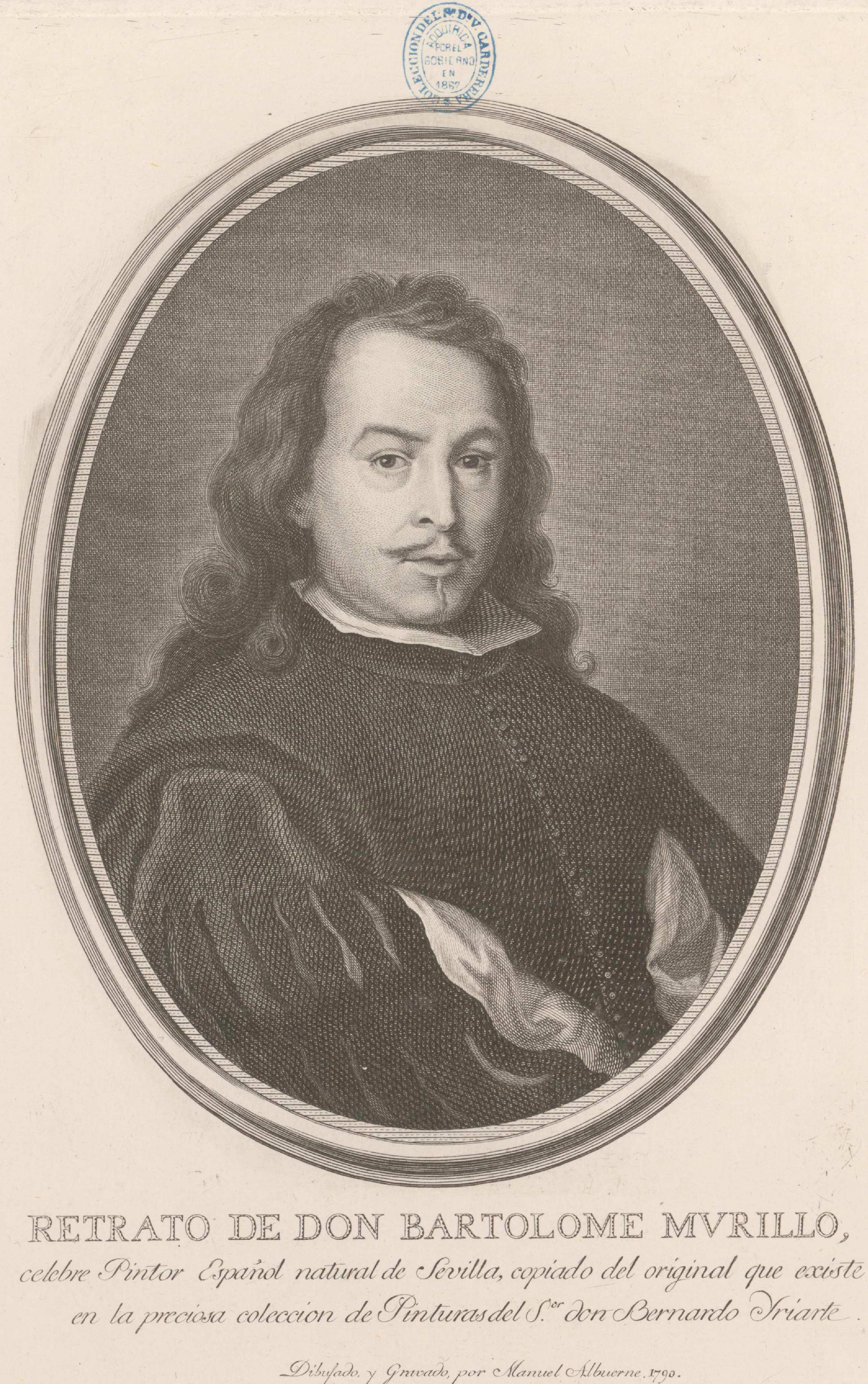 Retrato de Bartolomé Esteban Murillo dibujado y grabado por Manuel Albuerne. Inscripción: "RETRATO DE DON BARTOLOME MVRILLO, celebre Pintor Español natural de Sevilla, copiado del original que existe en la preciosa colección de Pinturas del S.or Don Bernardo Yriarte." 1790. Biblioteca Nacional de España